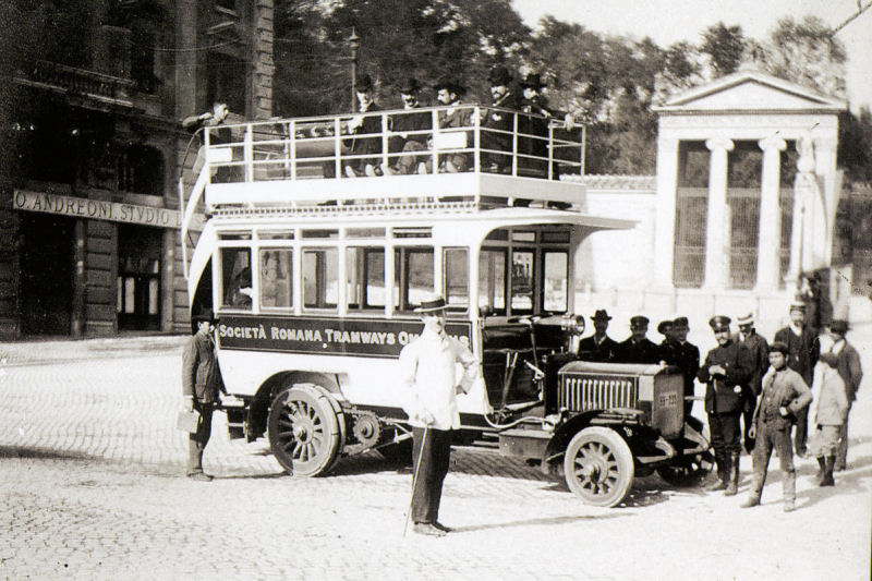 Autobus sperimentale della SRTO